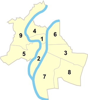 Arrondissements de Lyon, géolocalisation